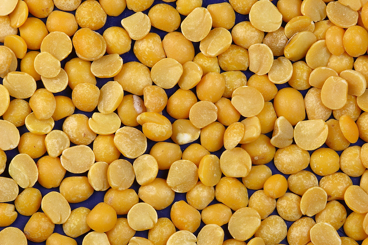 Split pea